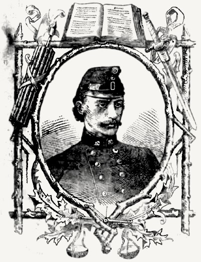 Jan Křtitel Piperger (1838 - 1888), Mistr popravčí.